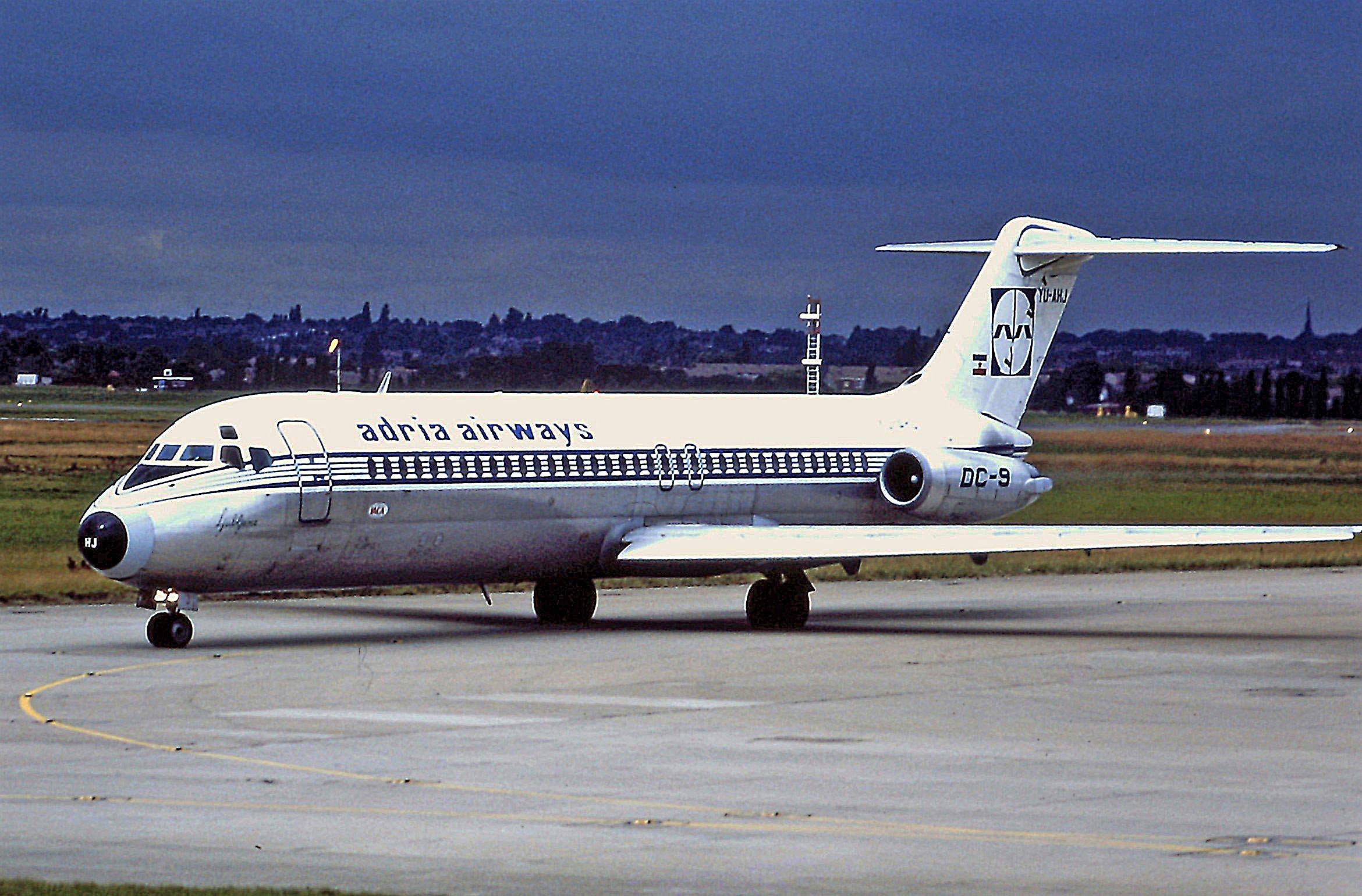 YU-AHJ DC9-32 Adria Birmingham 03-08-1989